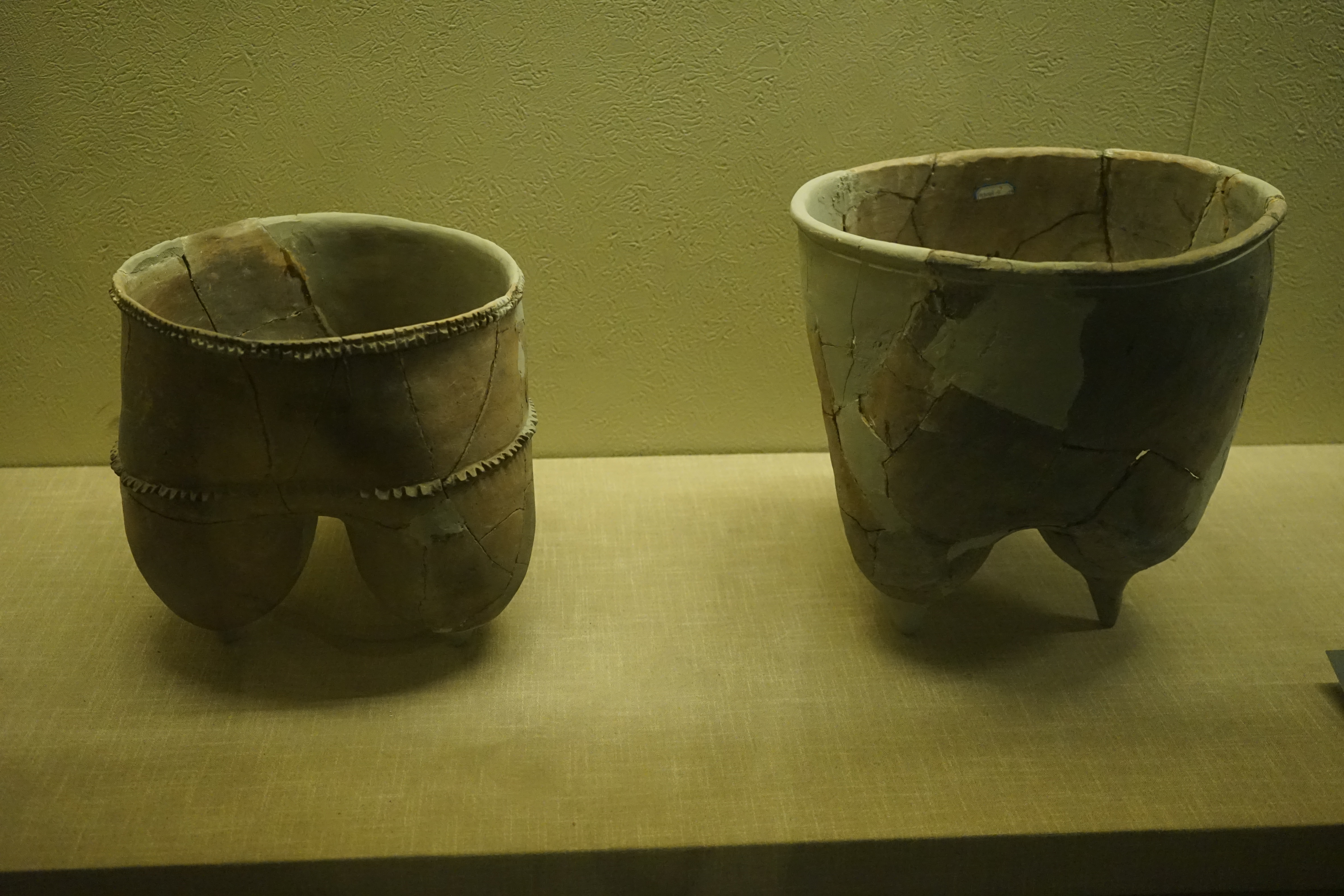 陶鬲earthernware Separate 白金宝遗址三期遗存。大庆博物馆三楼